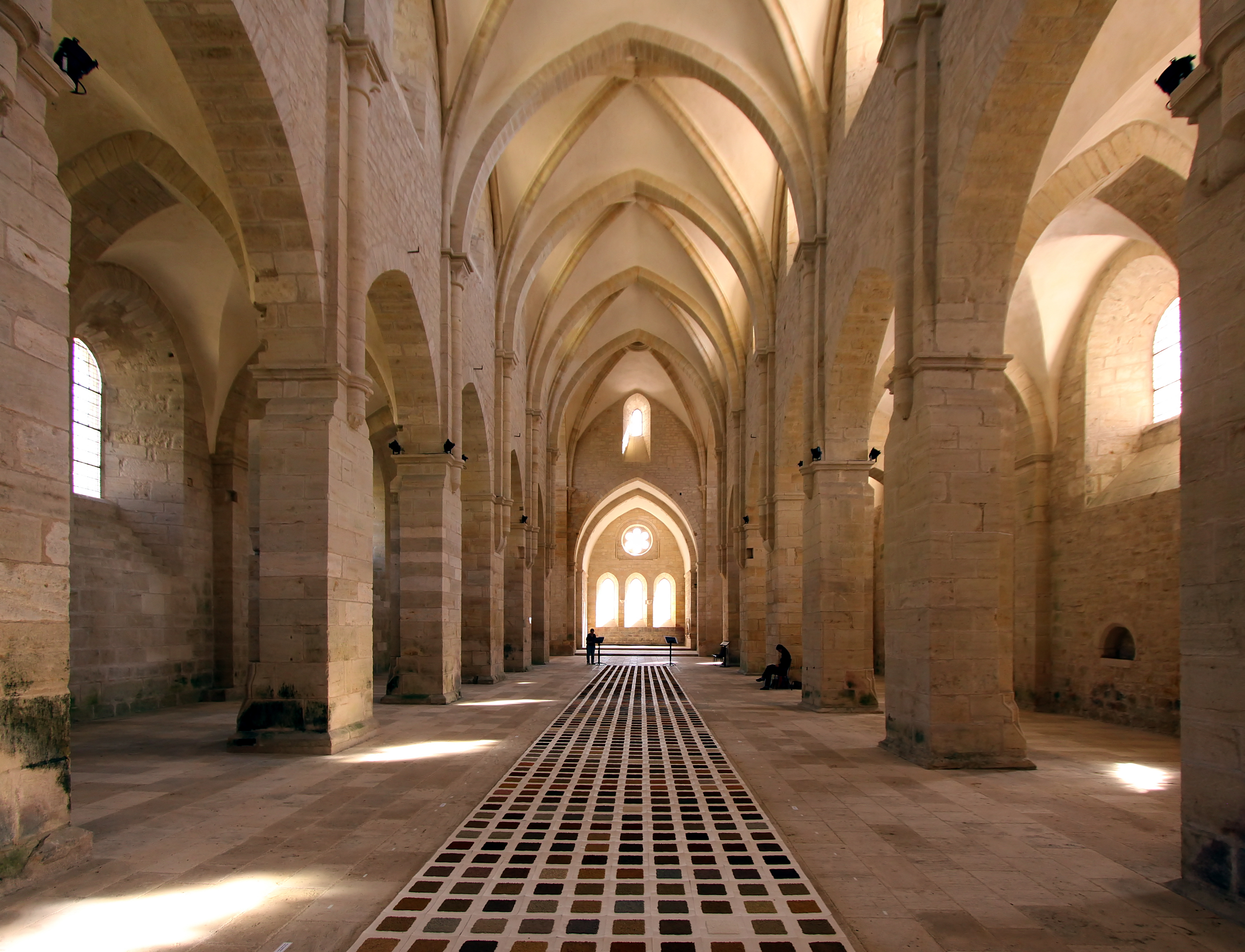 Dreischiffige Abteikirche des Zisterzienserklosters Noirlac im französischen Département Cher